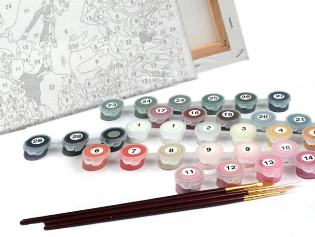 Раскраски по номерам